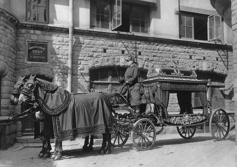 Katafalkvagn med hästar utanför Freys Hyrverks kontor, Grev Turegatan 11